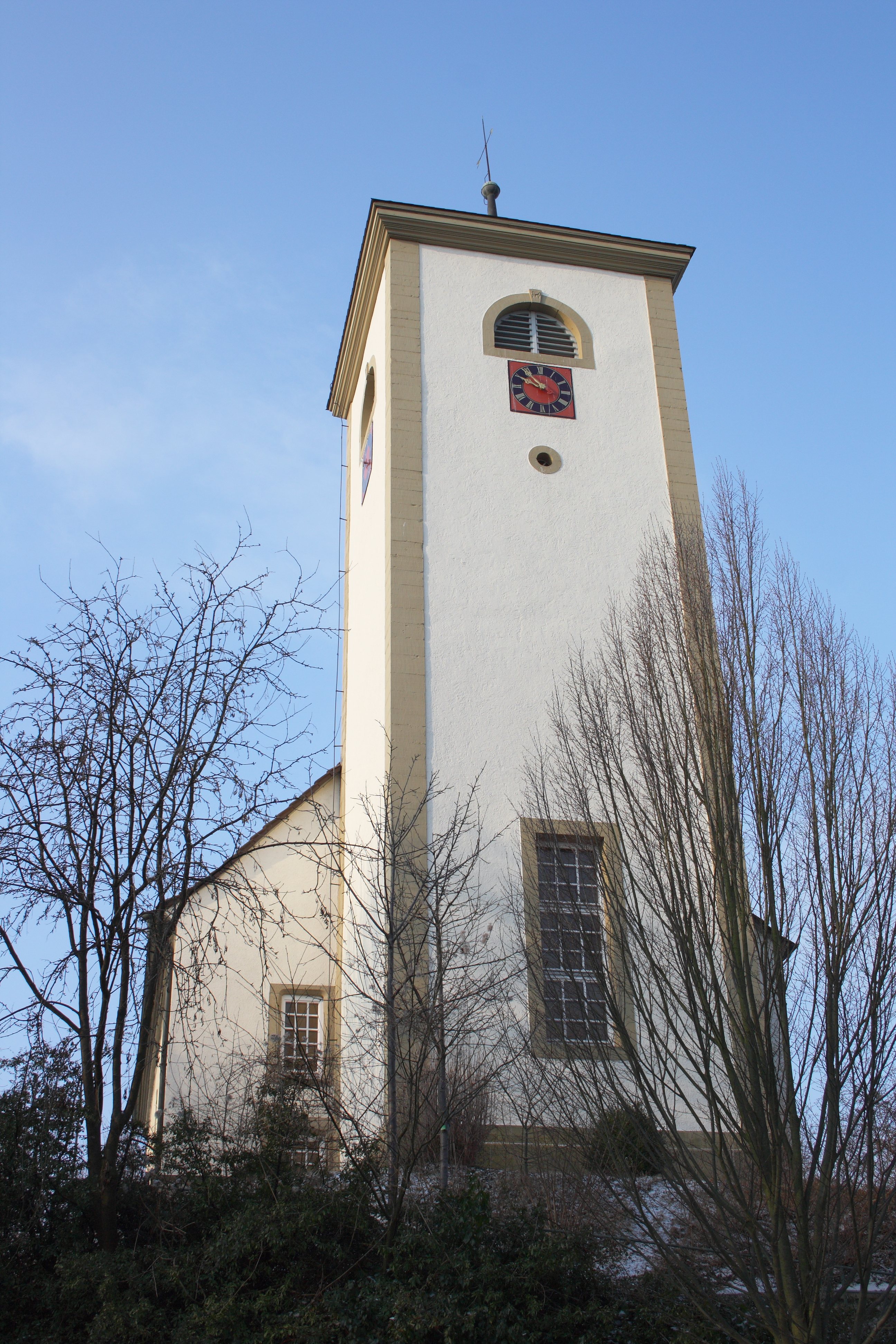 Evangelisches Kirche in Stebbach